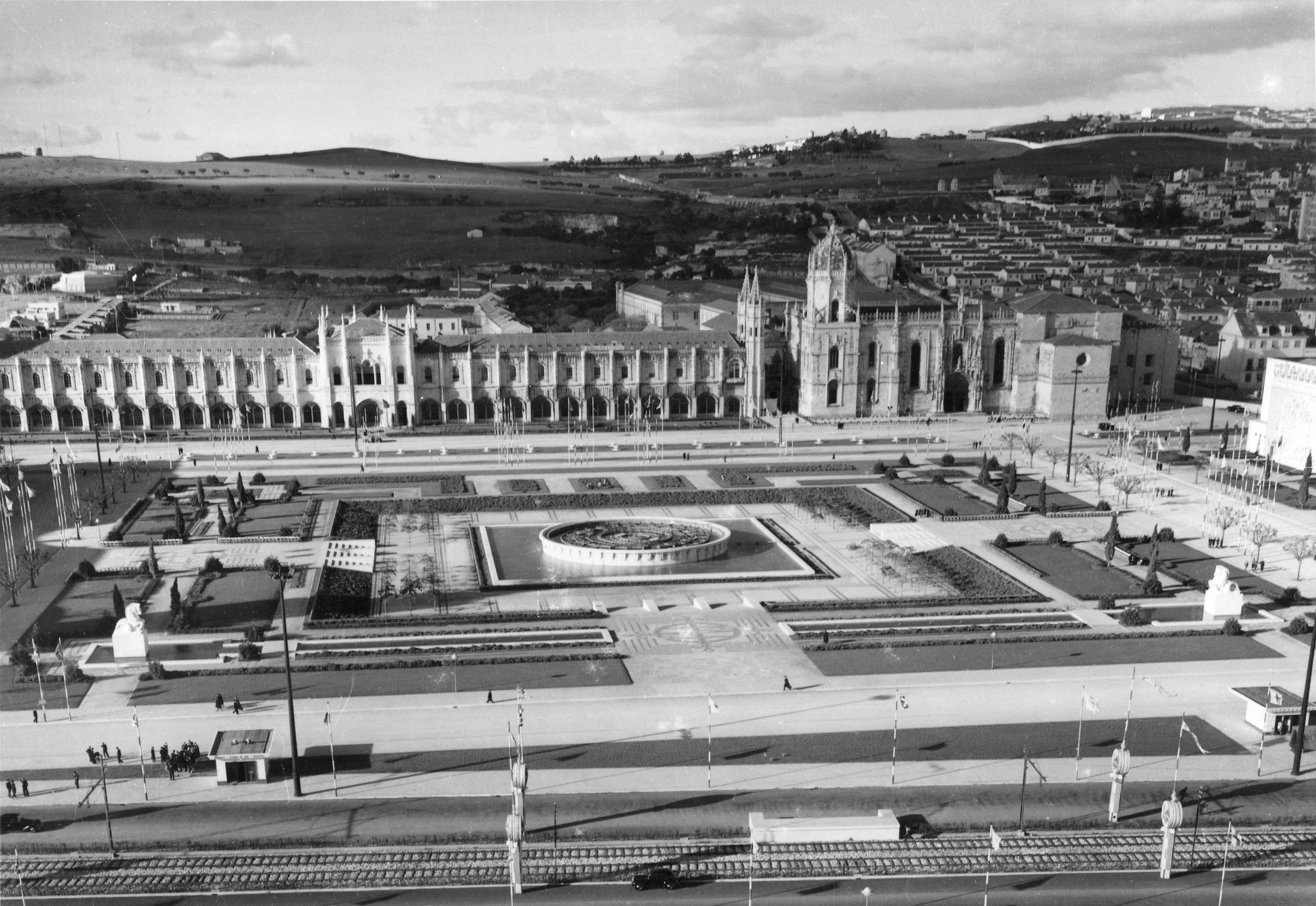 Mosteiro dos Jerónimos, Lisboa (Portugal): Vista geral.